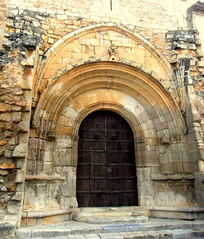 Monestir de Santes Creus (Aiguamúrcia)